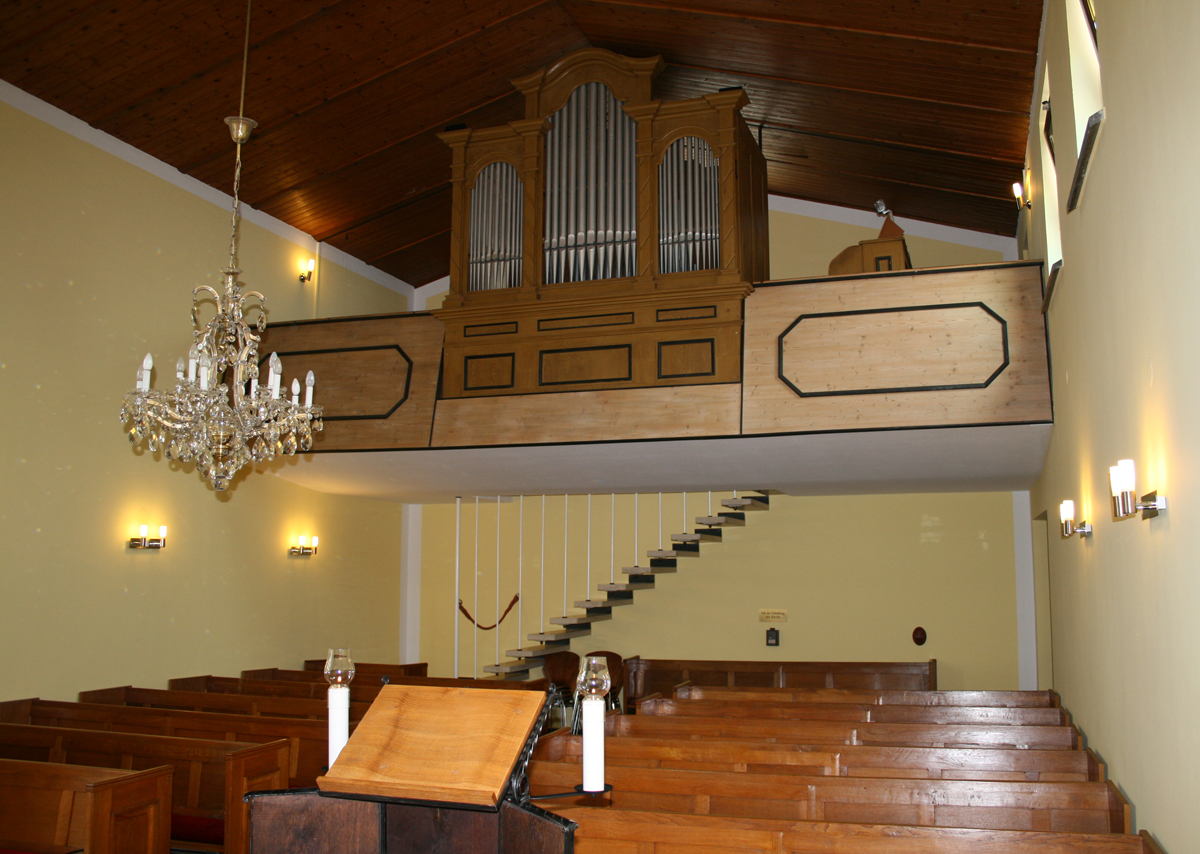 Kirchenschiff und Orgel von St. Peter & Paul, Weidenberg